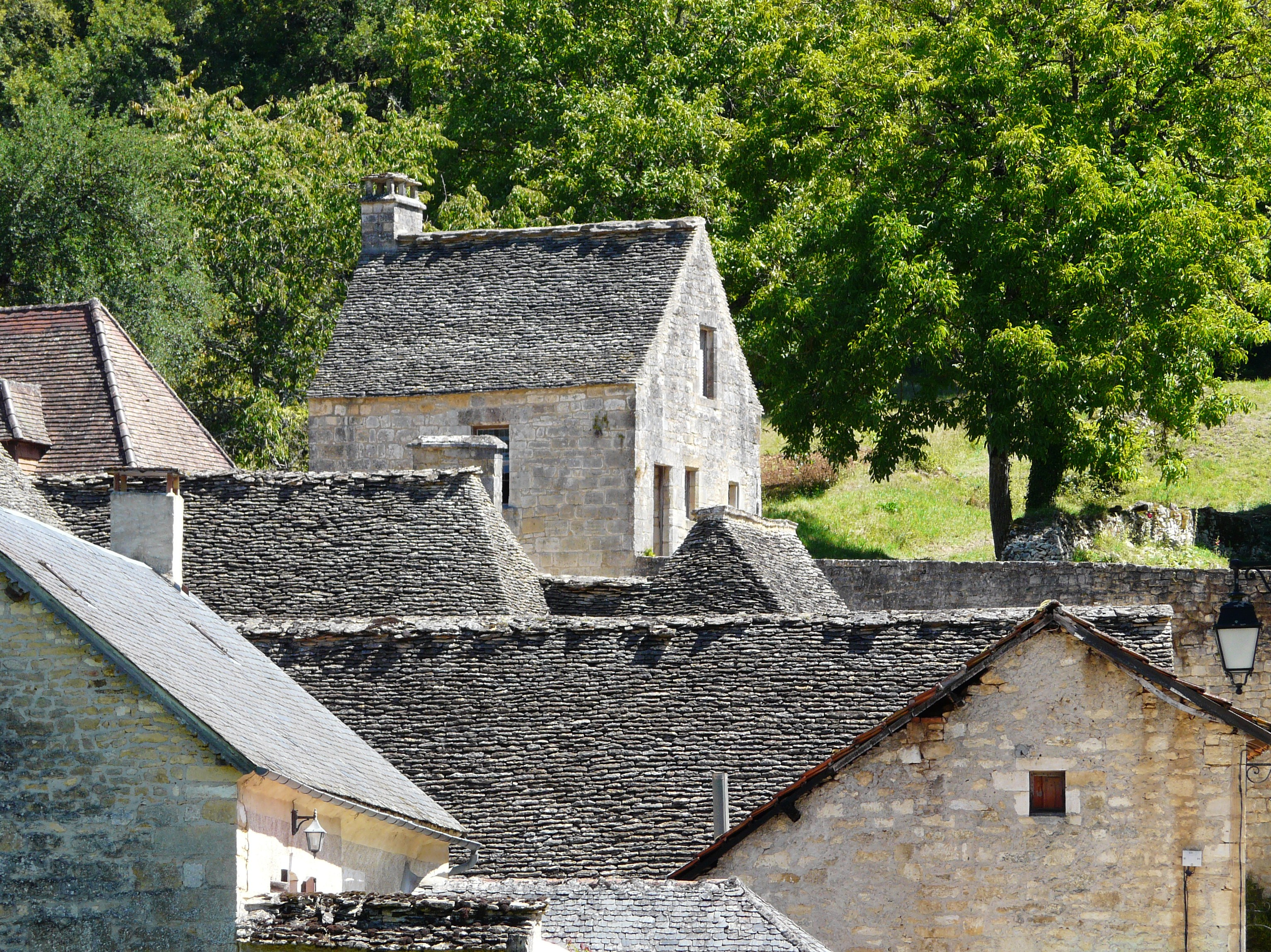 Ensemble de toits en lauzes à Saint-Amand-de-Coly, Dordogne, France